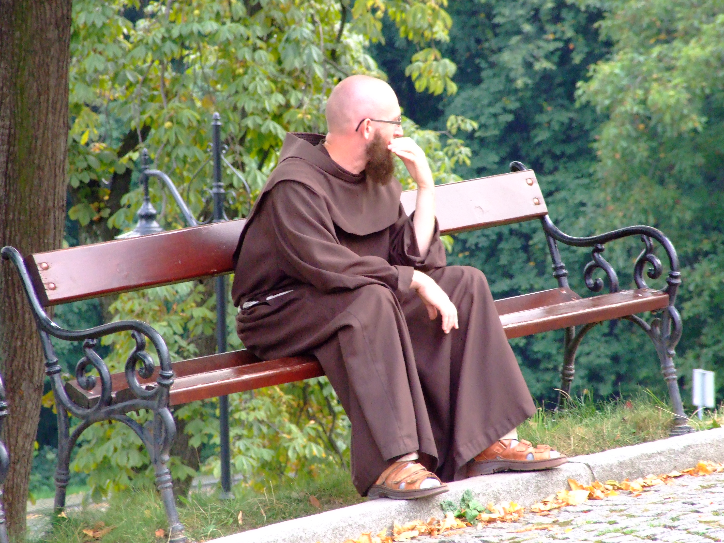 Bernardyn z klasztoru w Kalwarii Zebrzydowskiej